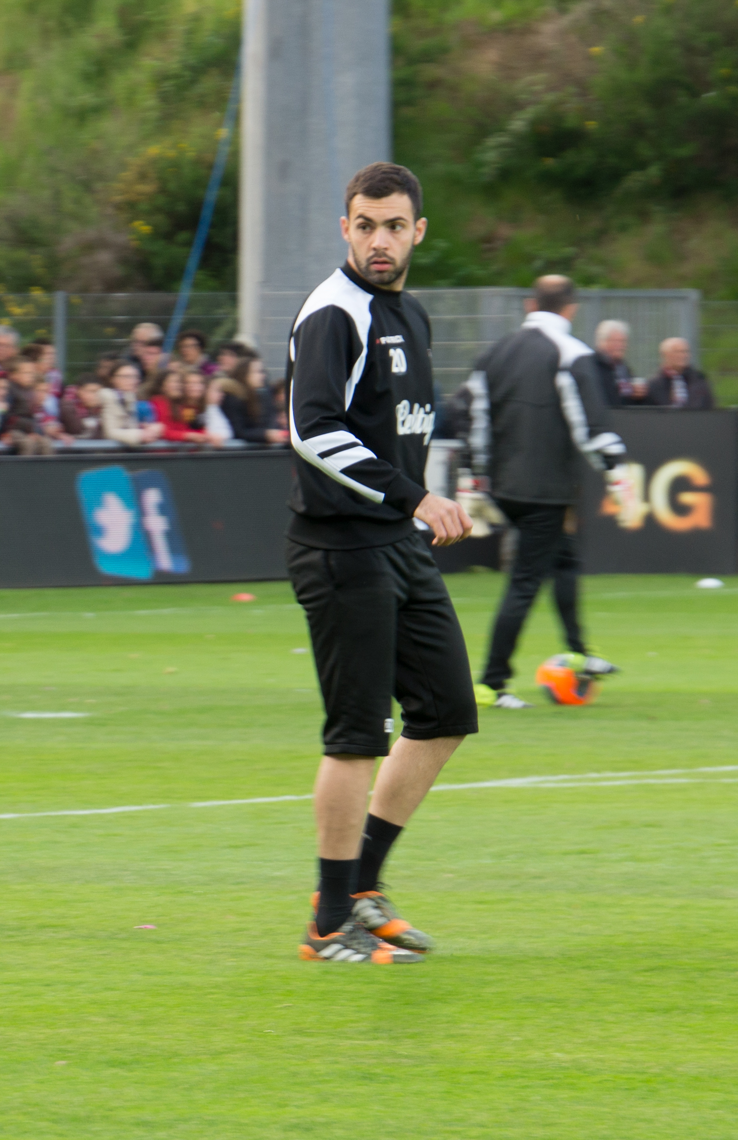 Guingamp-Toulouse le 10 mai 2014